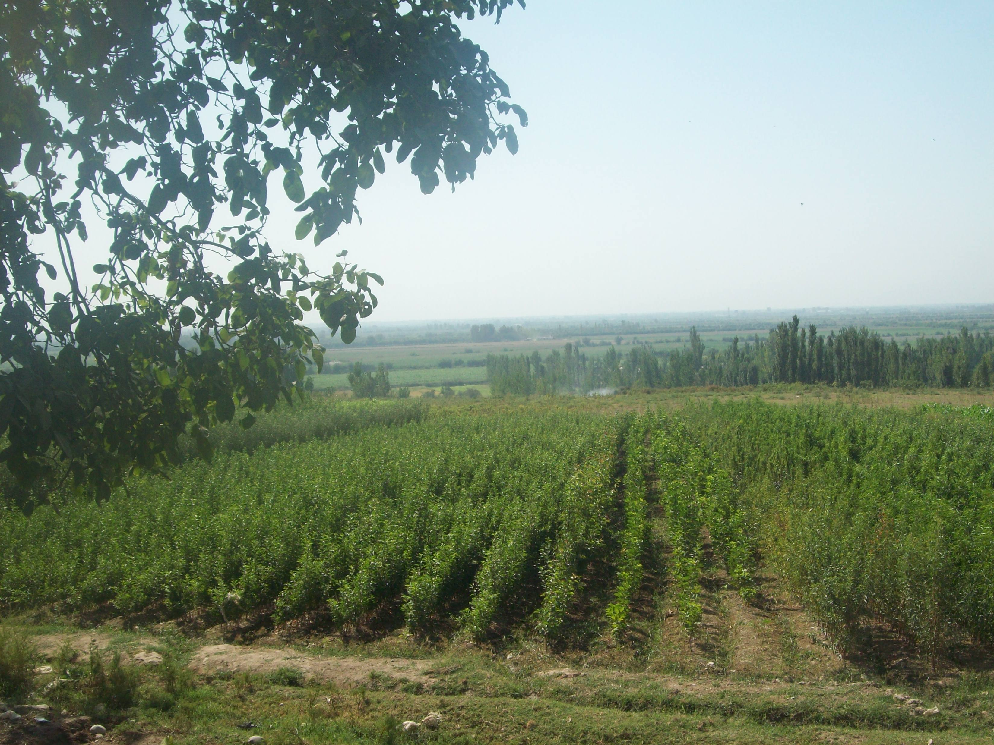 Плодовый питомник в Уйчинском районе Наманганской области.